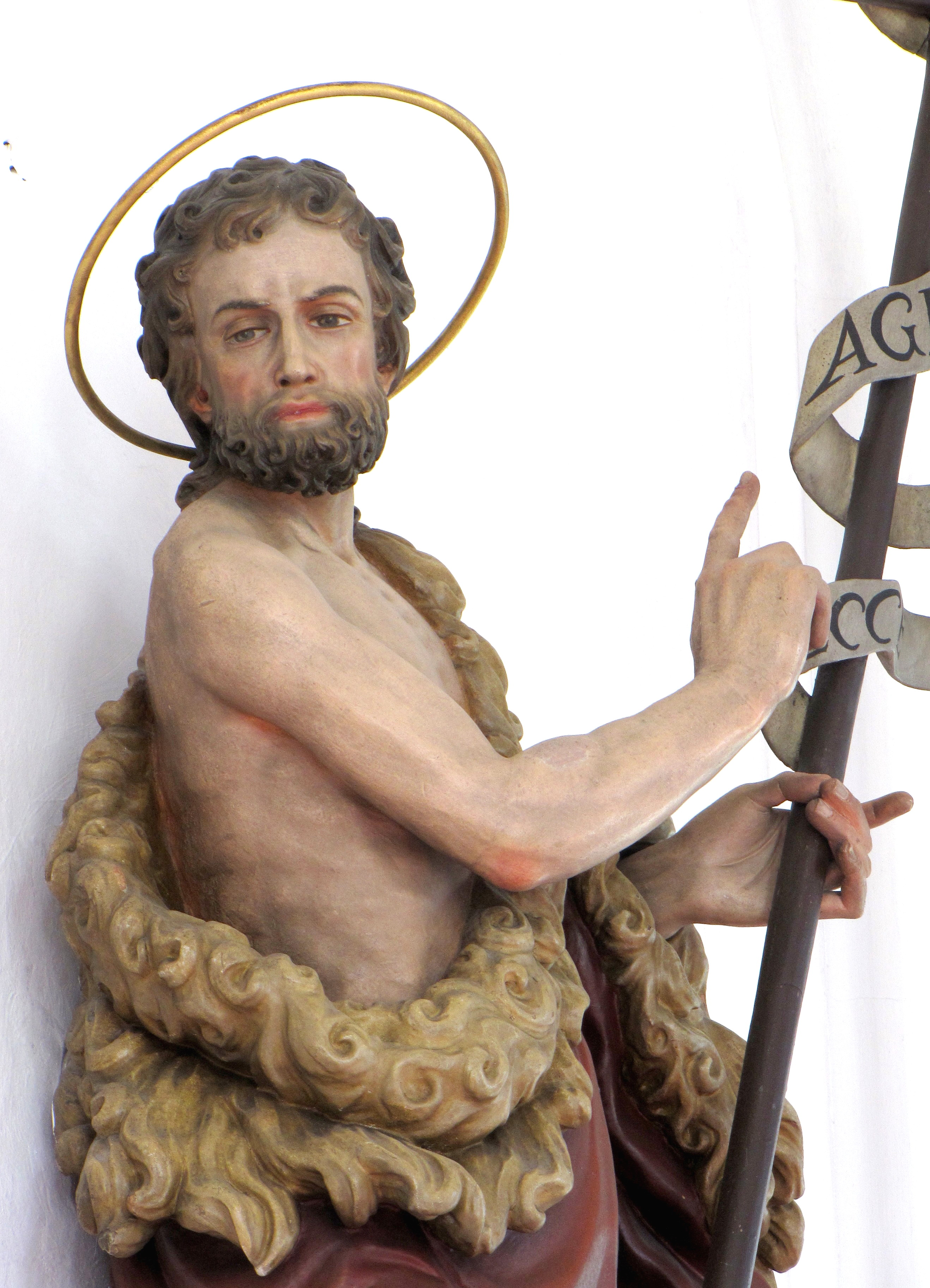 Figur des Hl. Johannes des Täufers von Johann Hops in der Filialkirche St. Michael in Pfronten-Steinach